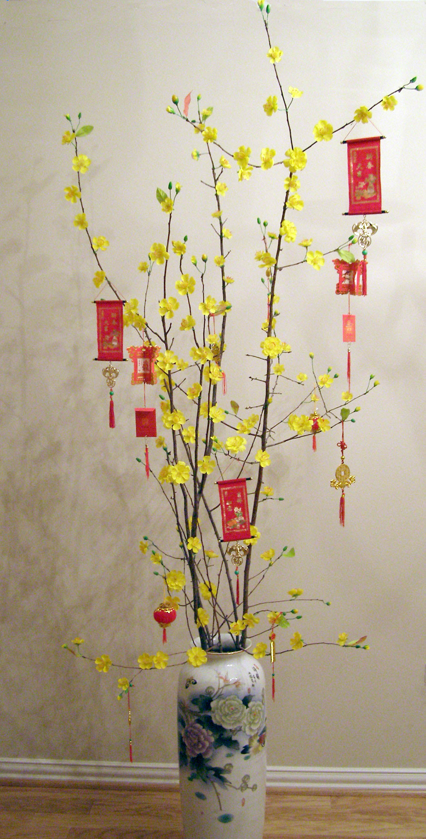 Nhành mai ngày Tết. Hạt sương Mai lung linh chờ nắng sớm Khách má Đào hoan hỉ tiếp tân niên. LĐ